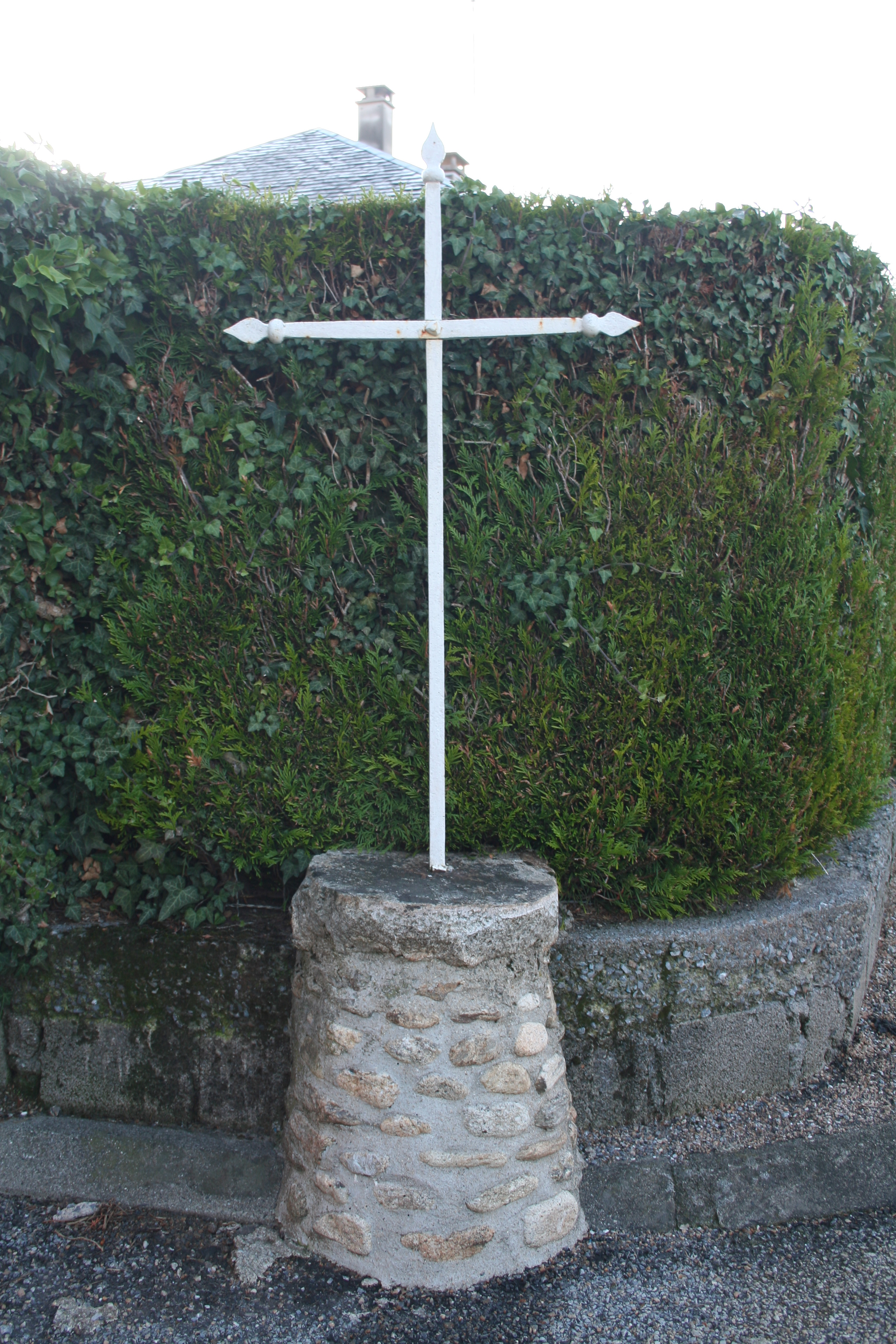 Lacaune (Tarn) - croix près de la tour-silo